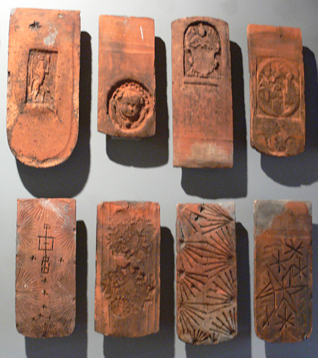 Feierabendziegel (Wortherkunft unklar: besonders geschmückte, letzte Ziegel eines Auftrags? Ziegel zum Ende des Ziegler-Jahres, d. h. der Brennsaison?), gebrannter Ton, Württemberg, 15.-19. Jh. Landesmuseum Württemberg (Außenstelle Museum für Volkskultur in Württemberg, Waldenbuch), 1.16